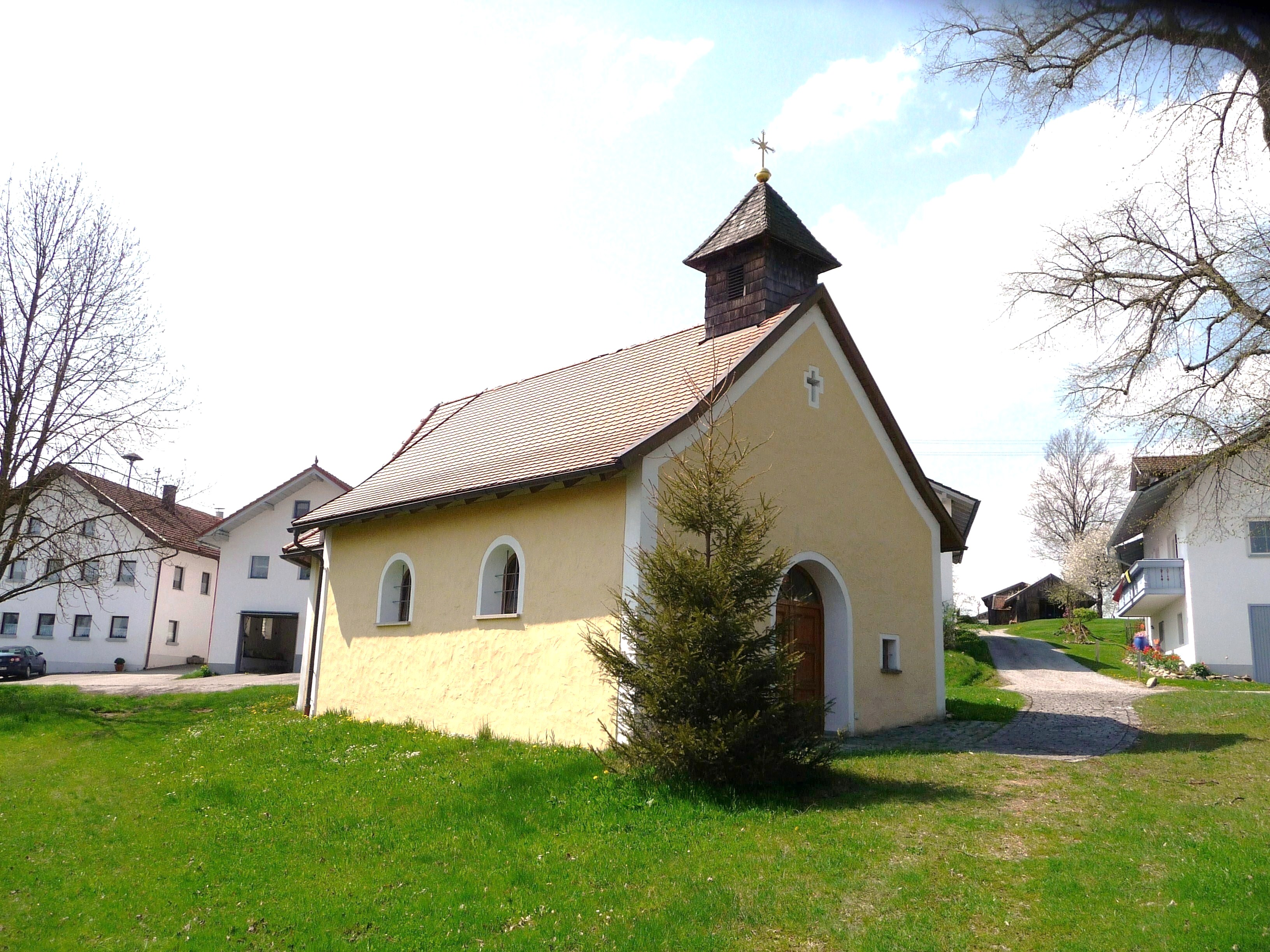 Die Dorfkapelle von Abtschlag, Gemeinde Kirchdorf im Wald